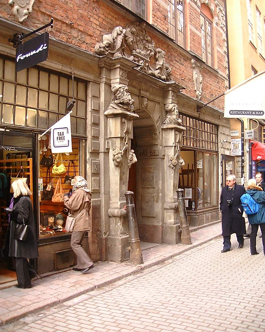 Detail of portal at 68, Västerlånggatan. Gamla stan, Stockholm.Västerlånggatan 68, Kornhamnstorg, Gamla stan, Stockholm. Sandstensportal av Aris Claeszon (död 1634 i Amsterdam), nederländsk skulptör. Verksam i Sverige från 1620-talet till 1630-talet.